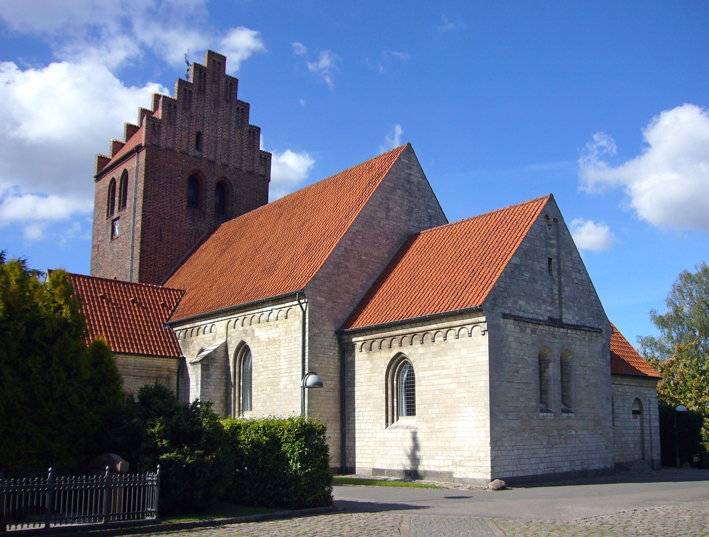 Brønshøj Kirke, Copenhagen, Denmark. Brønshøj Kirke